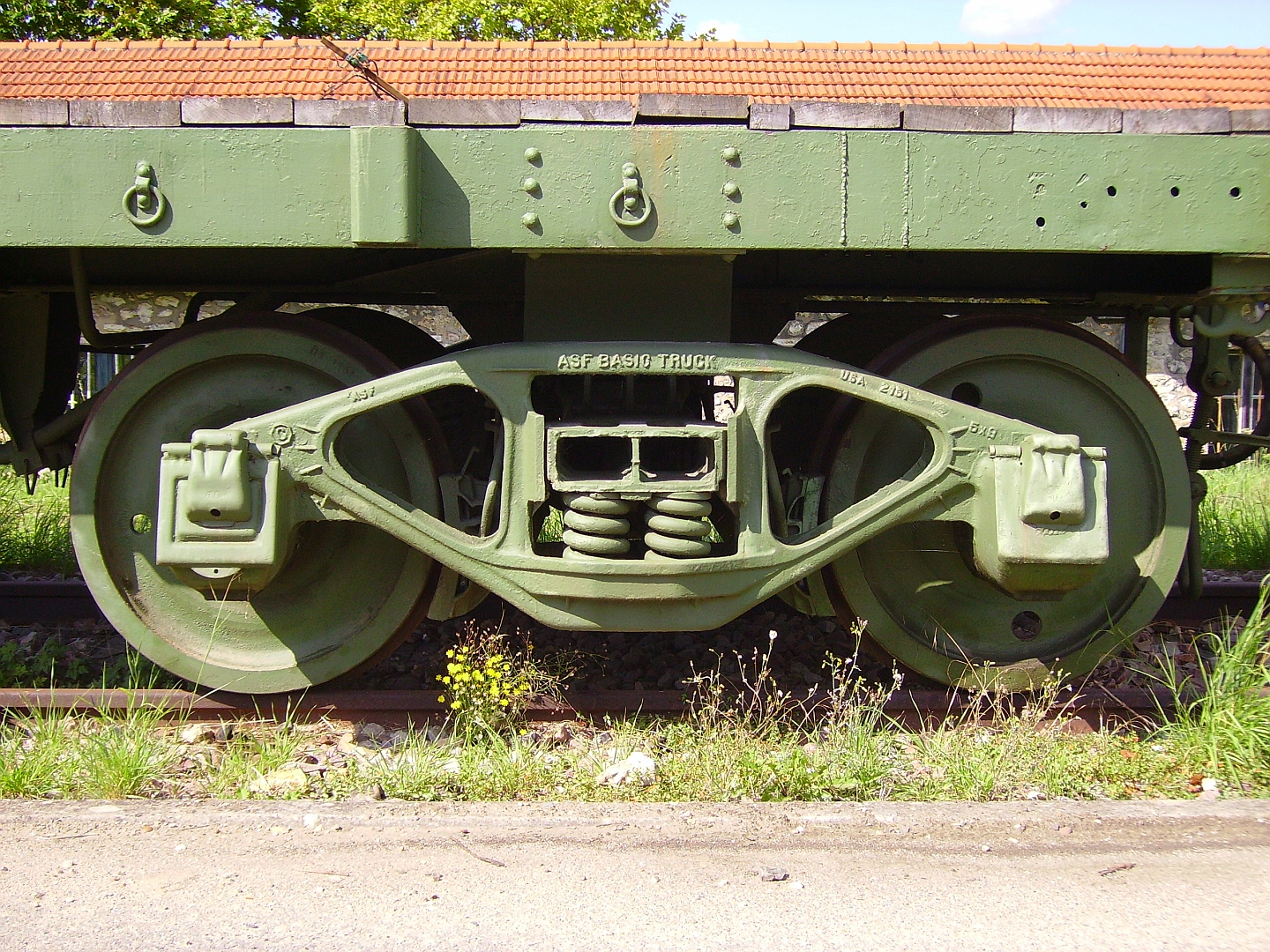 Bogie américain standard en acier moulé ASF BASIC TRUCK, d'un wagon de marchandises ex US Army au 5ème régiment du Génie de Versailles le 23/08/2008.